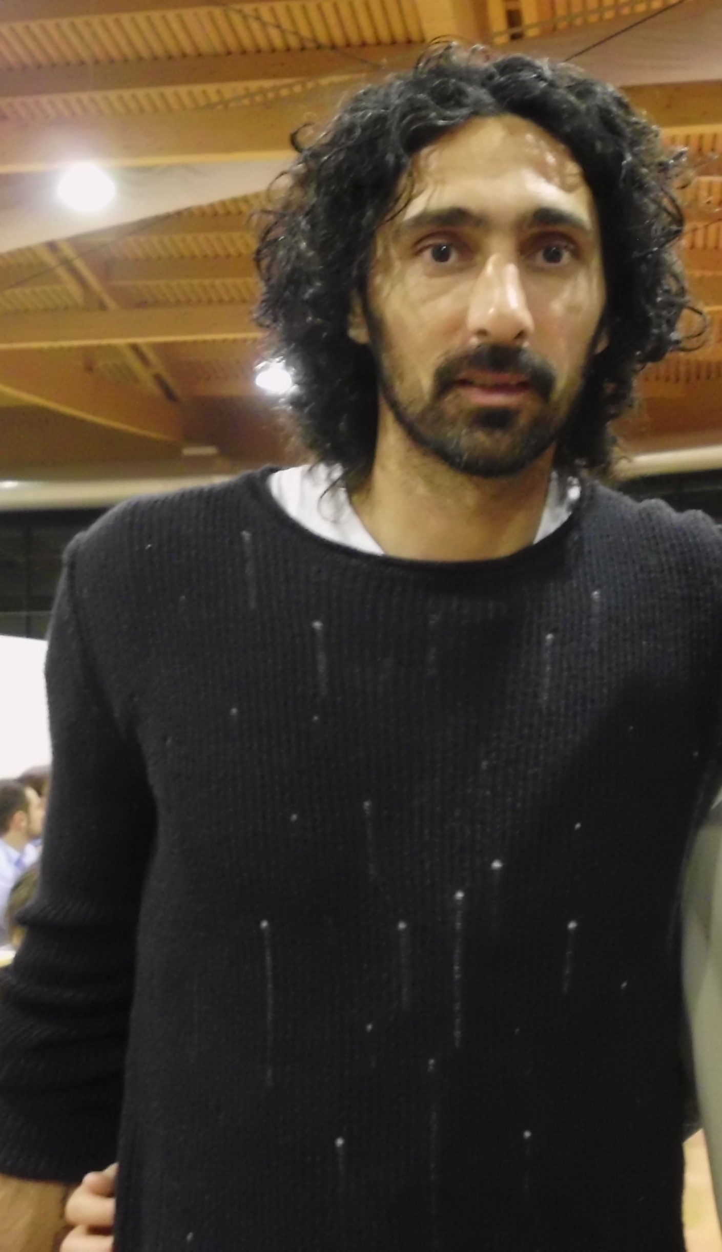 squizzi